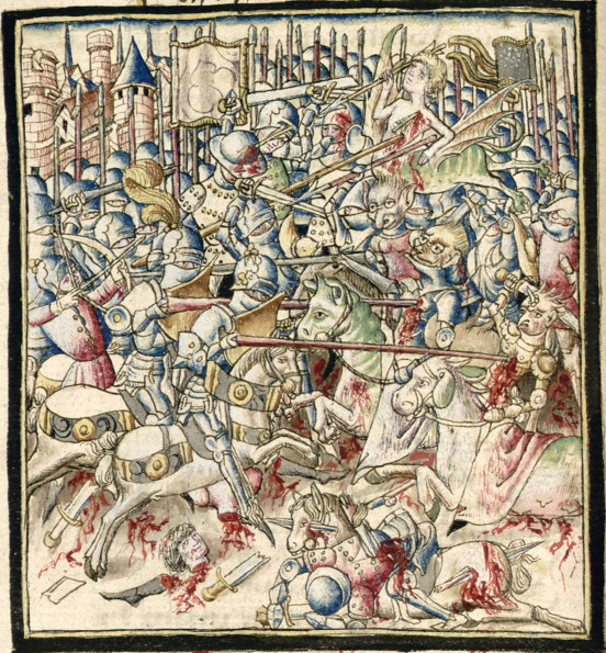 ChampionDesDames-Grenoble-Ms0352-f049v